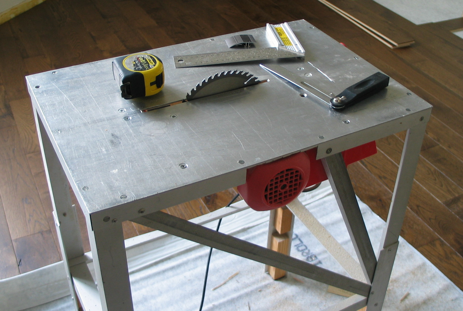 Scie circulaire stationnaire.